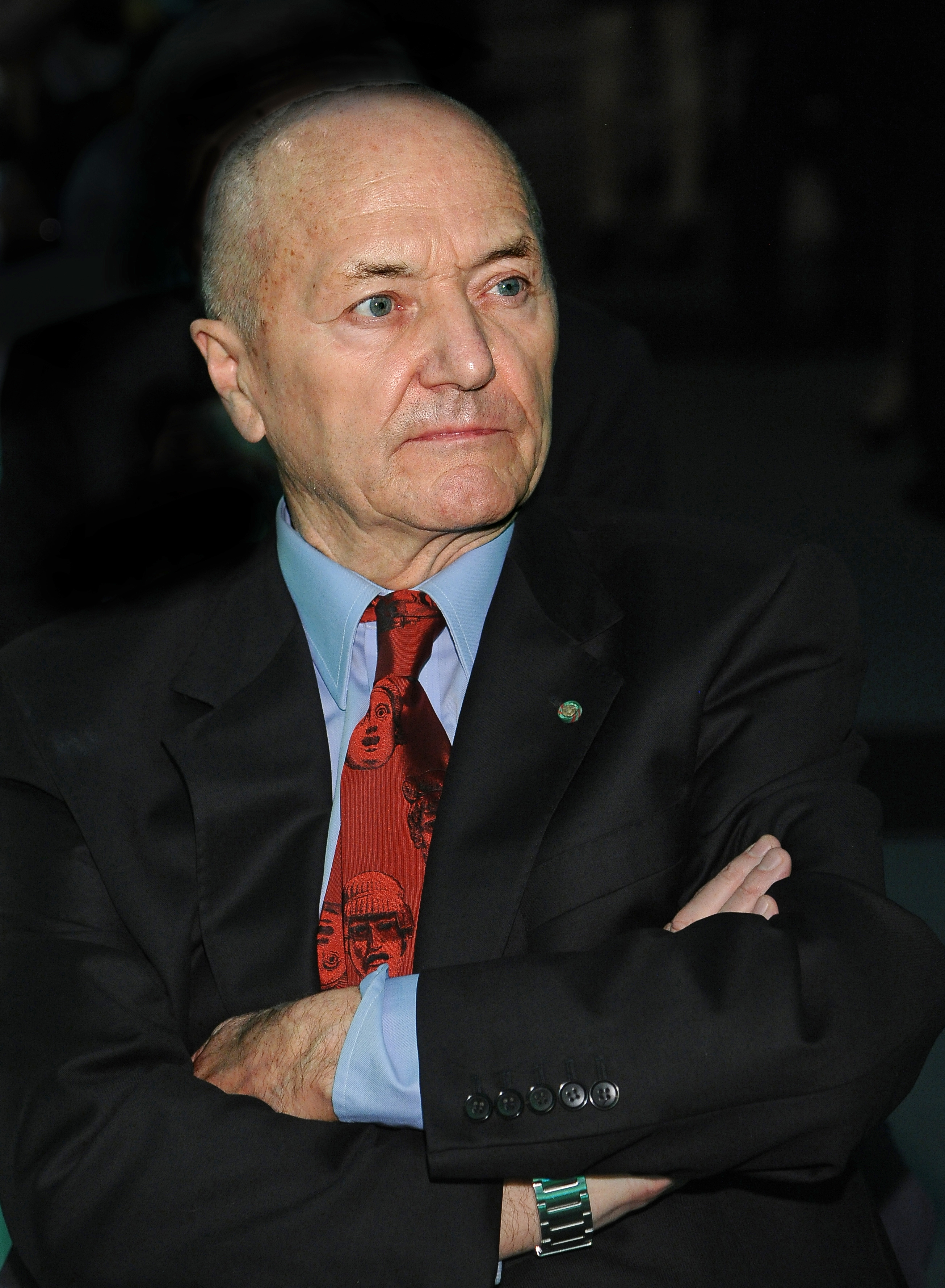 Jacek Pałkiewicz.